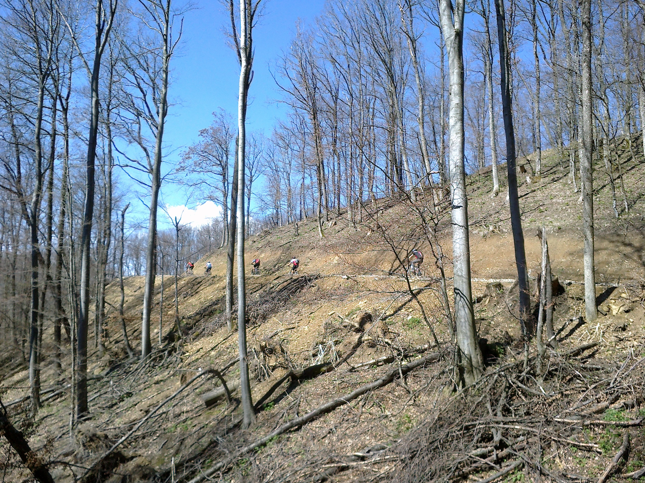 Bektež, Croatia